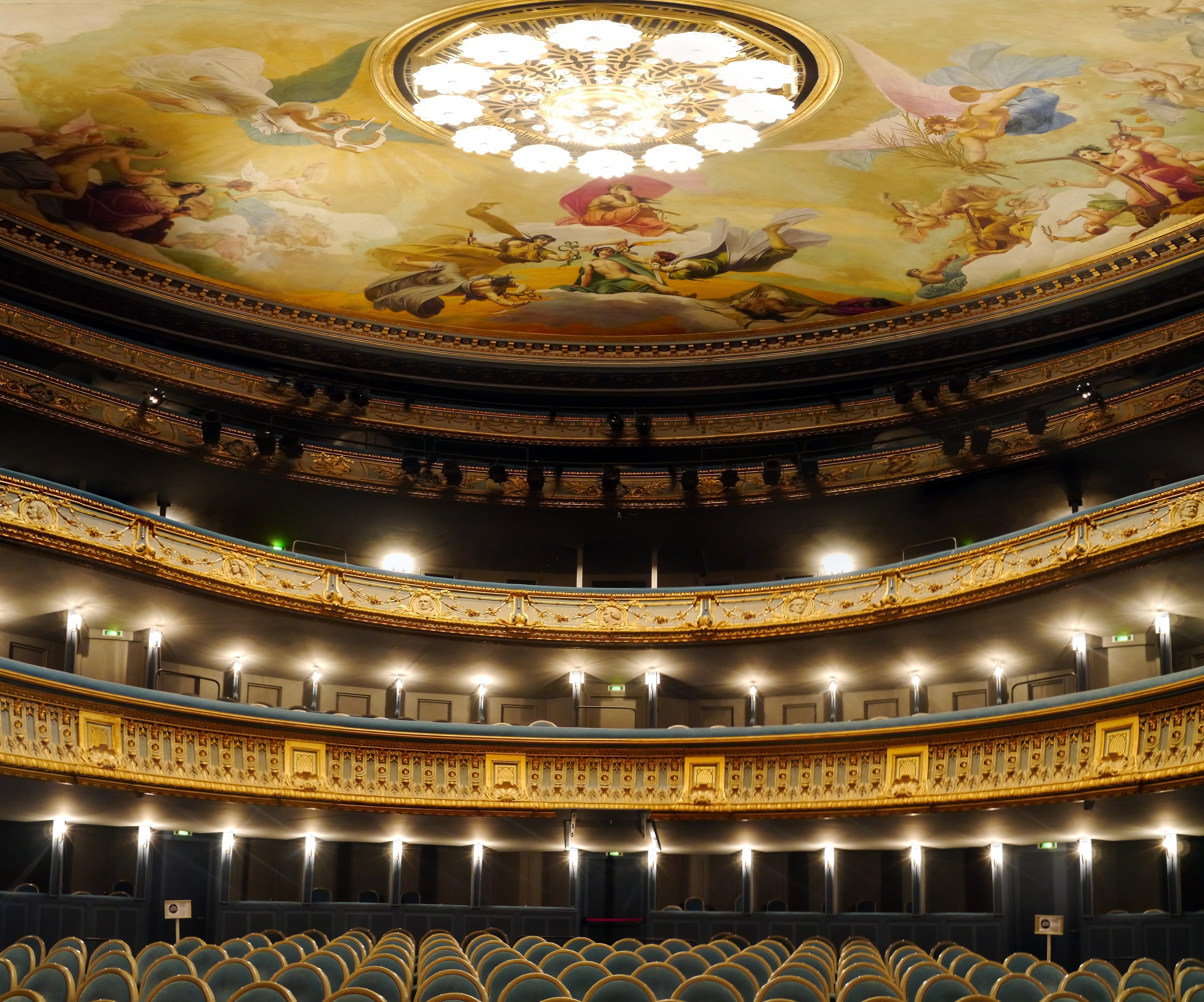 Théâtre Graslin, Nantes.